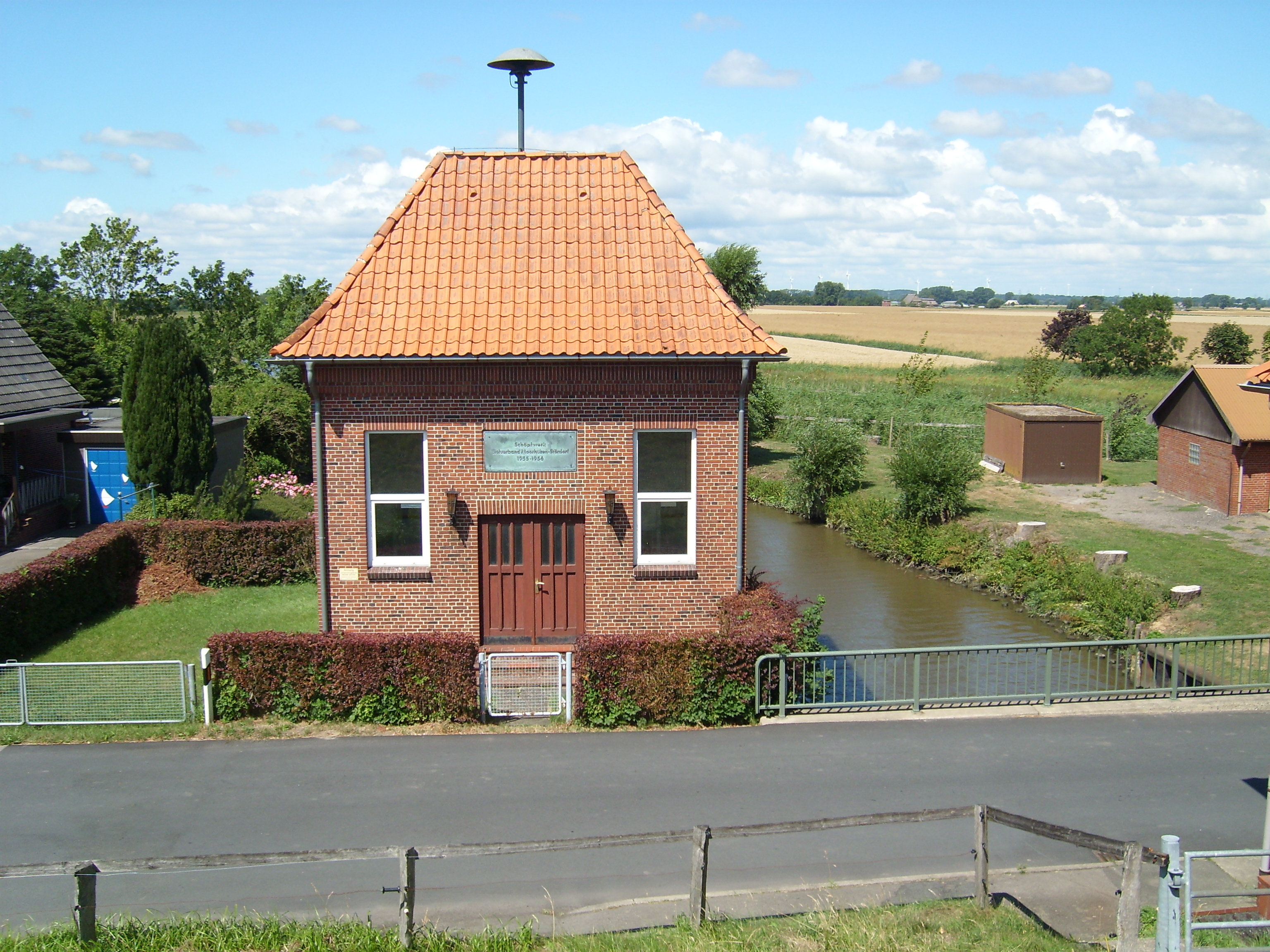 Schöpfwerk an der Mündung der Großen Feldwettern in die Stör in Kasenort